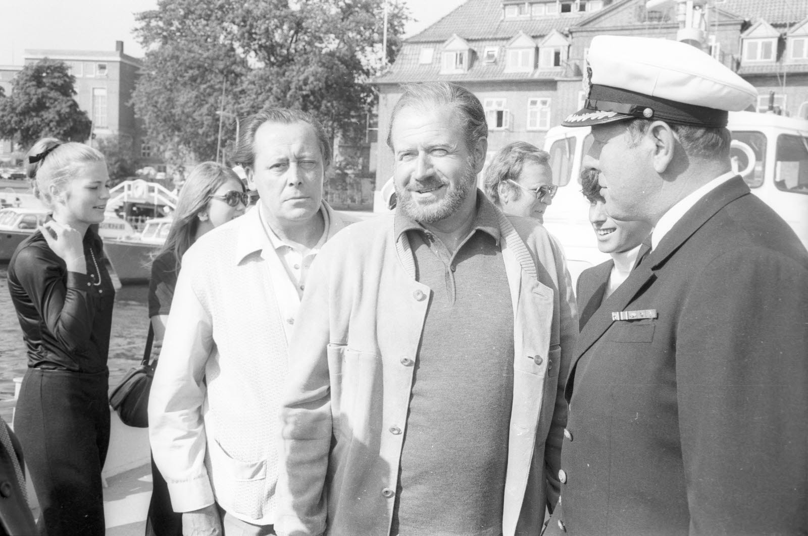 Der Schauspieler und Quizmaster kommt zur Premiere seines Films "Dr. med. Fabian - Lachen ist die beste Medizin". Links neben ihm Martin Jente (Butler "Herr Martin" aus der Quizsendung "Einer wird gewinnen").